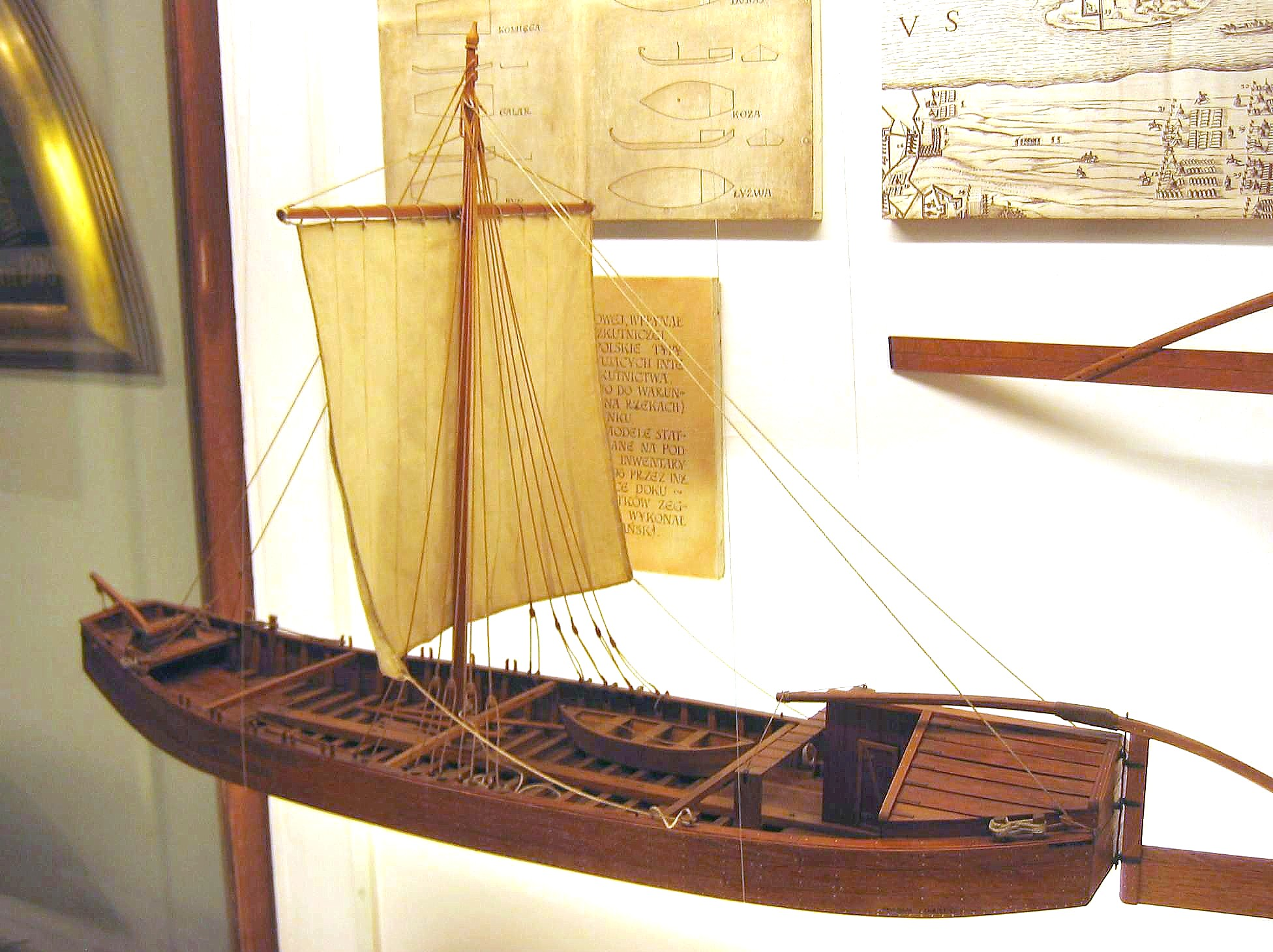 Byk